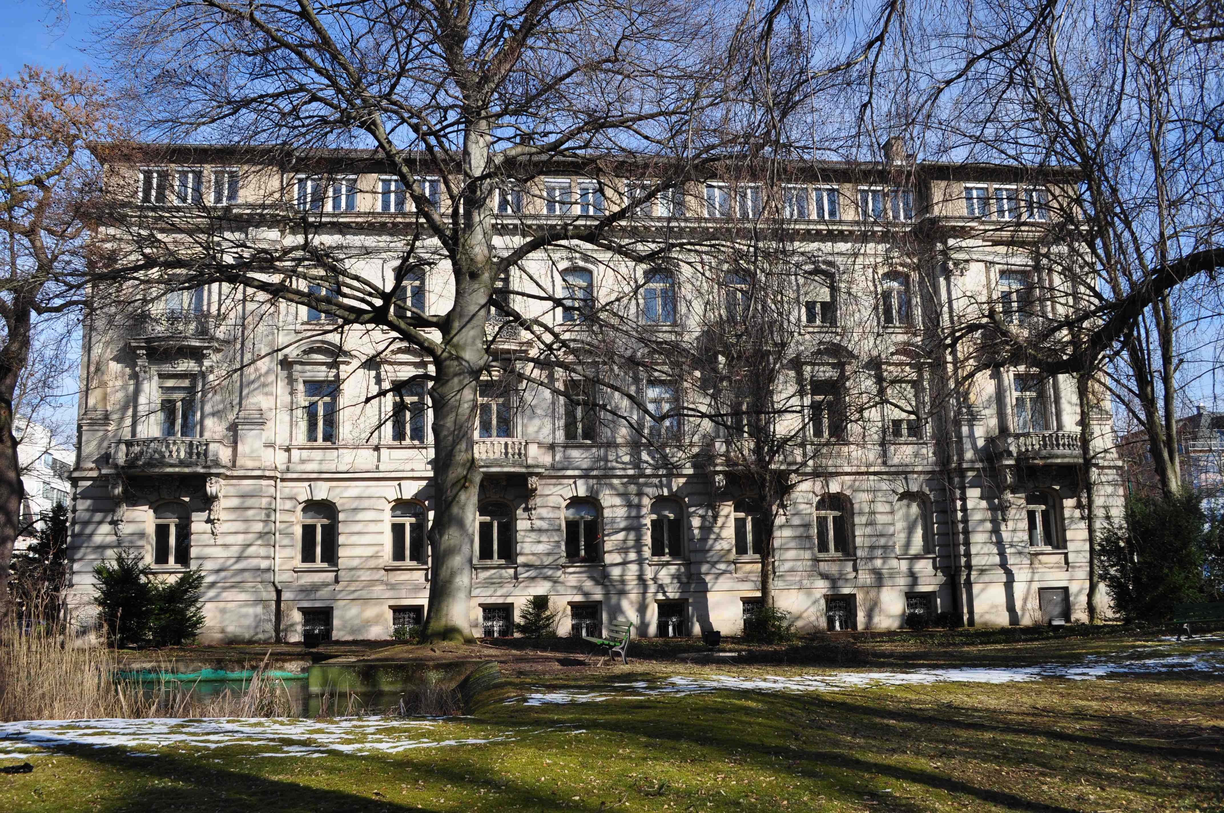 Haus Lindenstrasse 27 in Frankfurt am Main - Seitenansicht